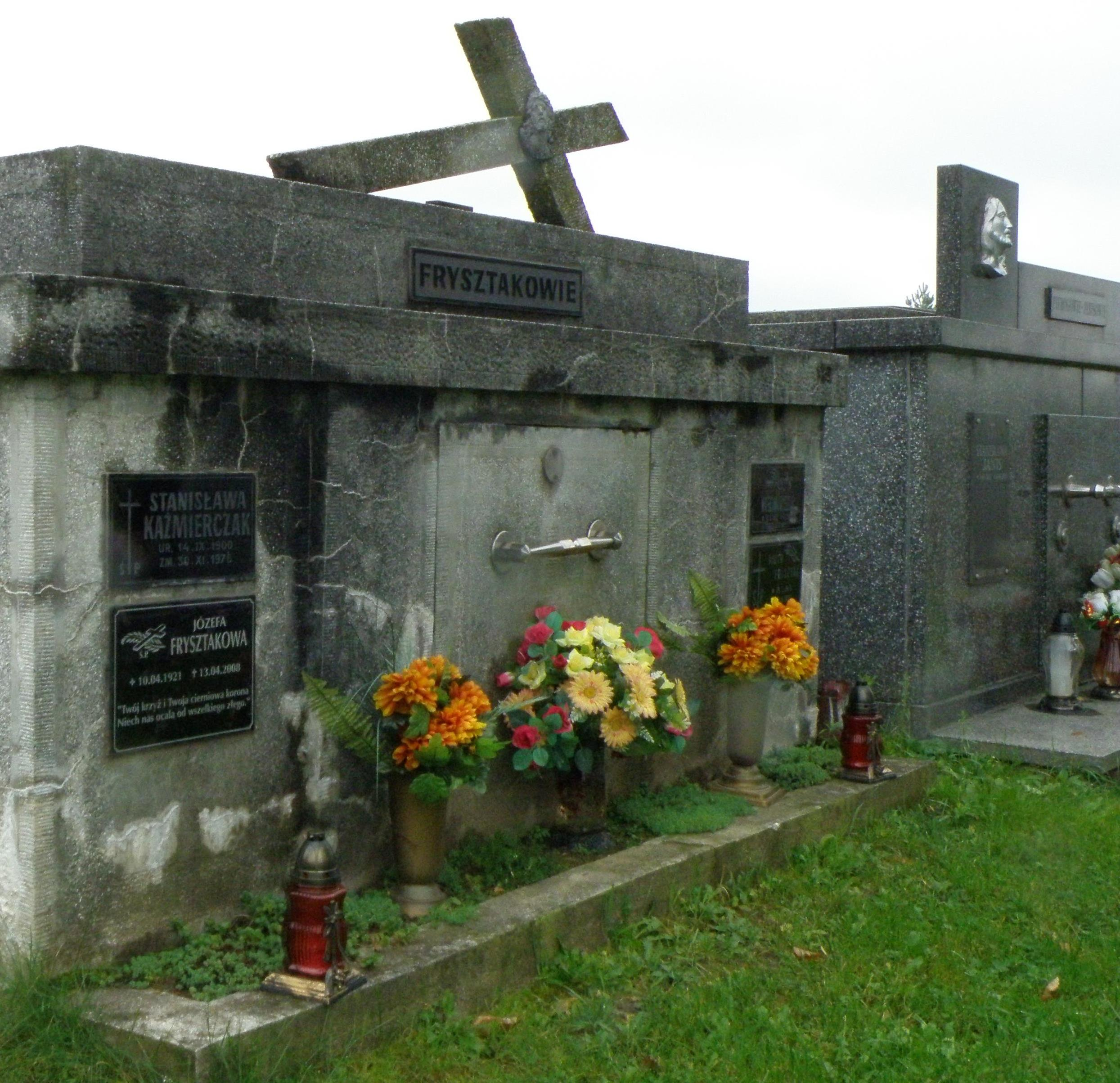 Grób Józefy Frysztakowej na cmentarzu komunalnym w Tarnowcu koło Tarnowa w województwie małopolskim.